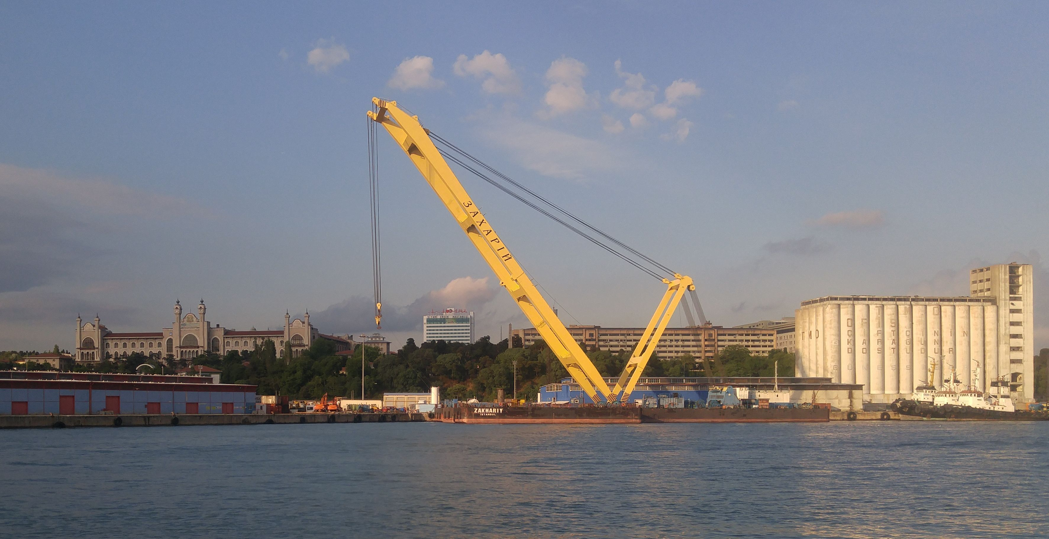 Zakhary Istanbul